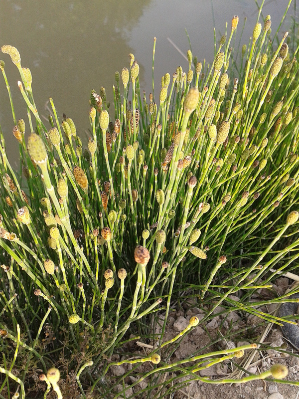 "CIMA DEL TALUD DESNUDO DE CARRIZO La banda por encima del talud y desprovista de carrizo y zarzas, y además, con menos agua disponible, es terreno de los llantenes, pero éstos ocupan una estrecha franja que comparten con cardos. Cuando el agua escasea y la degradación del suelo es mayor, son sucedidas por las matricarias y hordeum, especies ambas dominantes, muy frecuentes, y de distribución uniforme, acompañadas por achicorias, que ahora sólo quedan esqueletos blanquecinos, repartidas de forma aislada y regular. En esta banda se suceden de forma dispersa pero común las Euphorbia serrata; de forma más frecuente, los equisetos; en un par de zonas del largo talud hay lúpulos de distribución colonial pero con frecuencia muy aislada y finalmente los asfodelos, dispersos pero ocasionales."